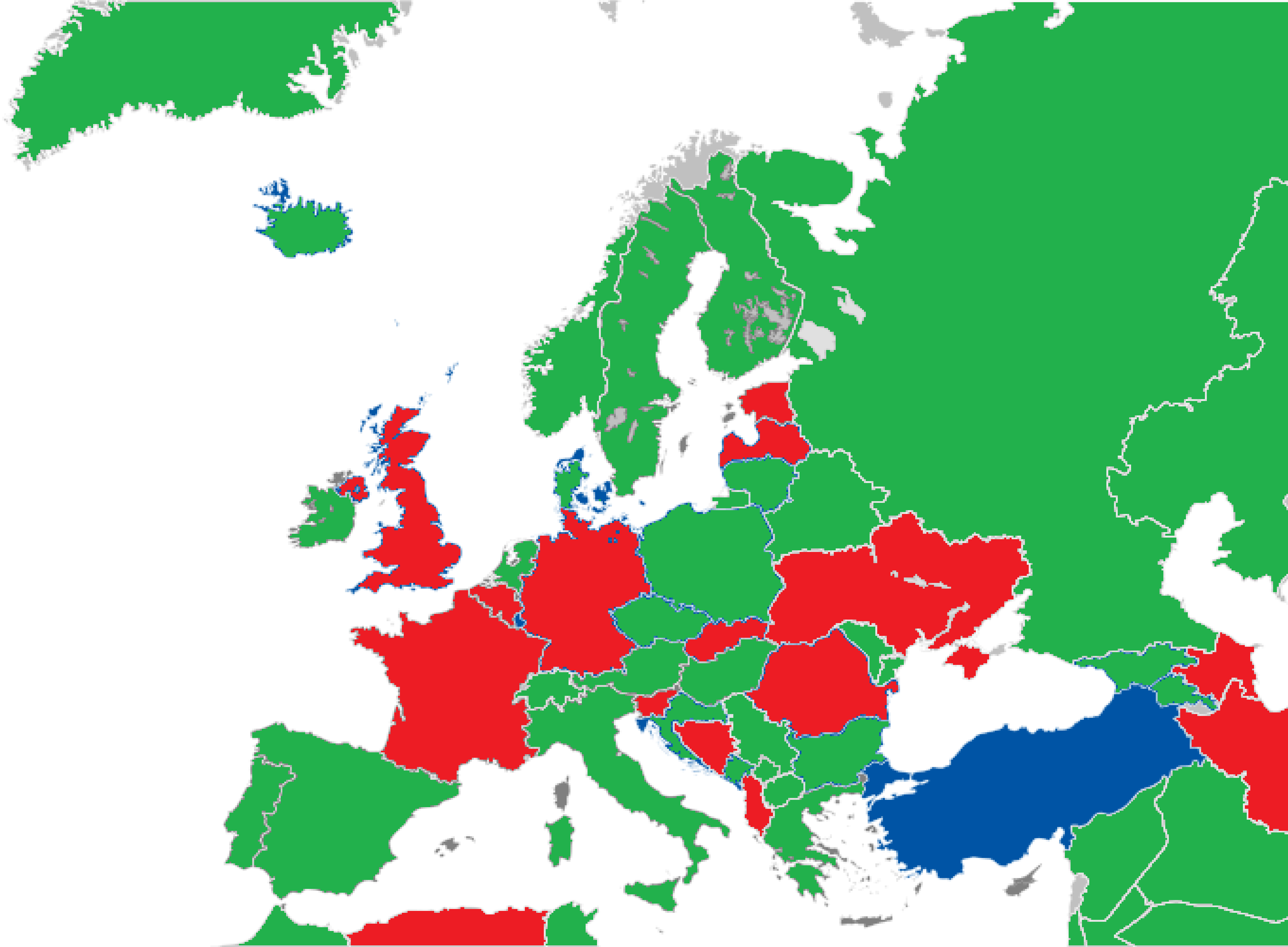 Recep tayyip Erdoğan'ın Avrupa Ziyaretleri